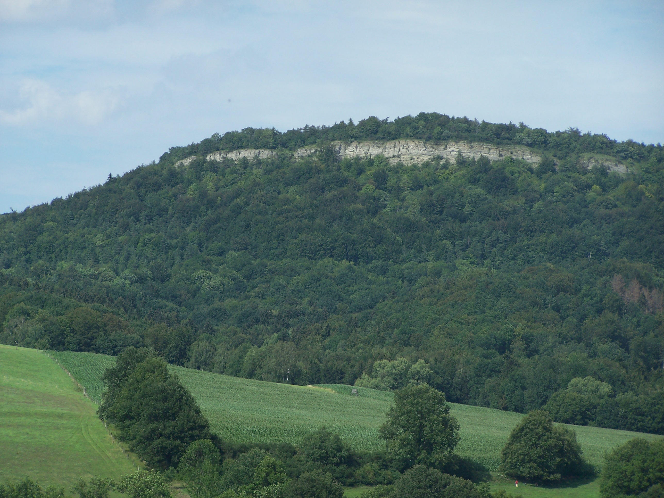 Blick von Schönau zur Westwand am Großen Hörselberg.